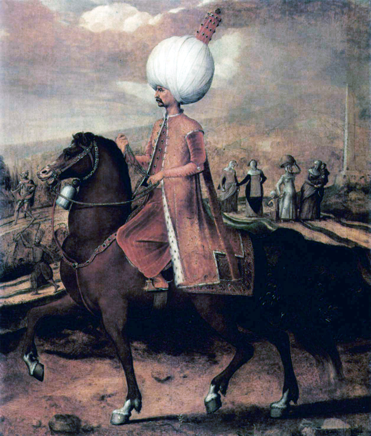 Sultan Süleyman II, der Prächtige?